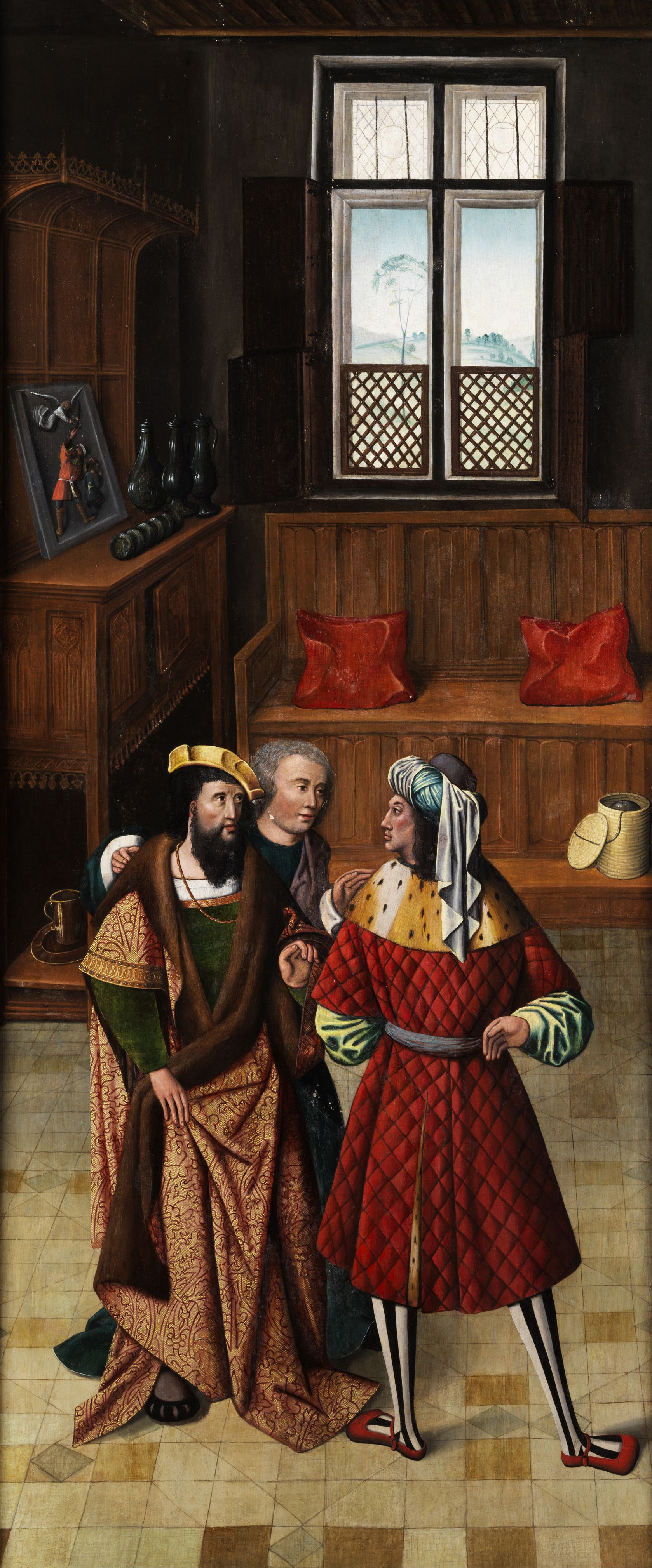 Samuel stellt dem König Saul den noch jungen David vor, Öl auf Holz. cm.